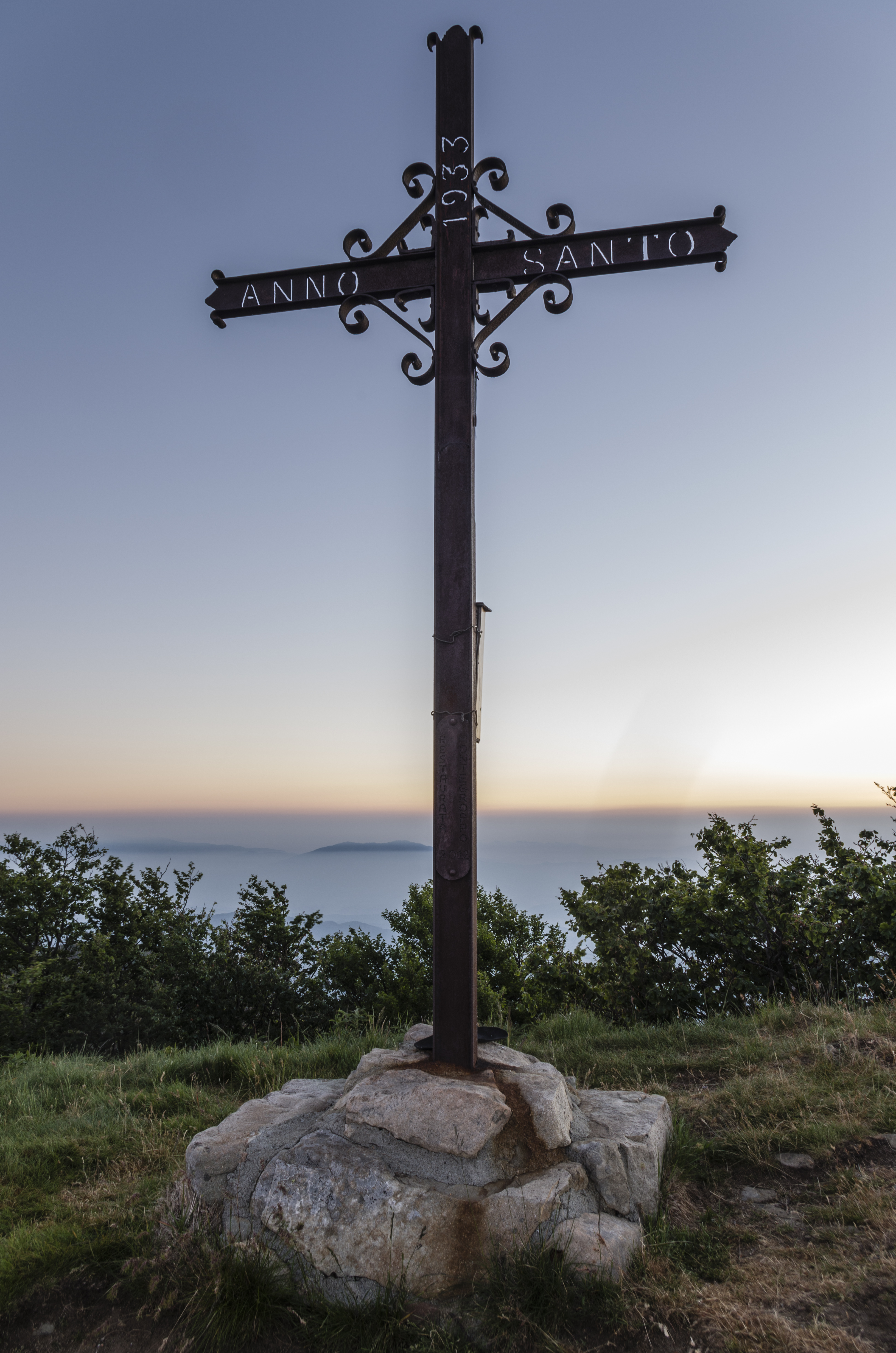 Croce di vetta del Monte Gottero scattata all'alba. This is a photo of a monument which is part of cultural heritage of Italy.